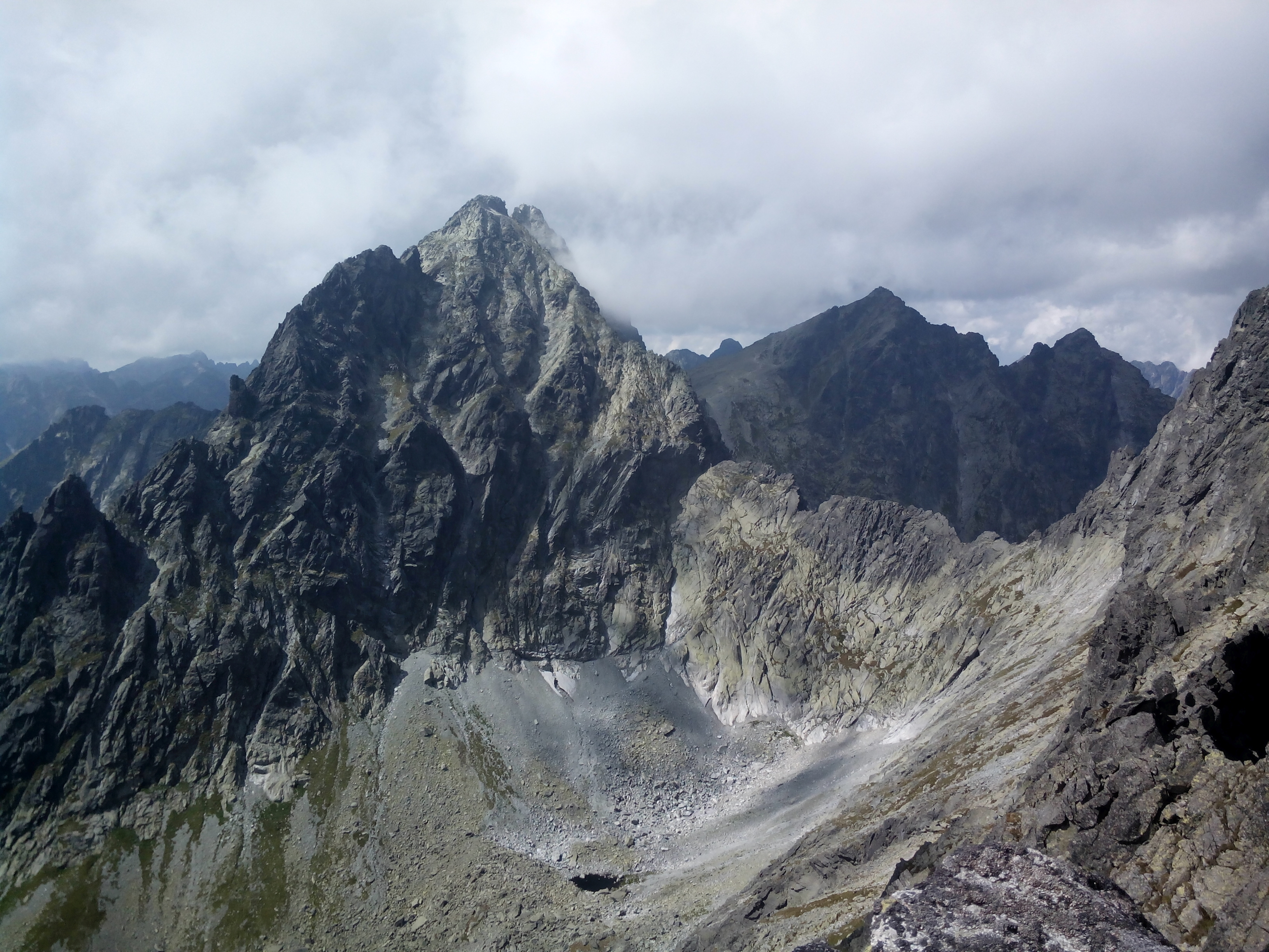 Widok ze Żłobistego Szczytu na Wysoką i Dolinę Rumanową